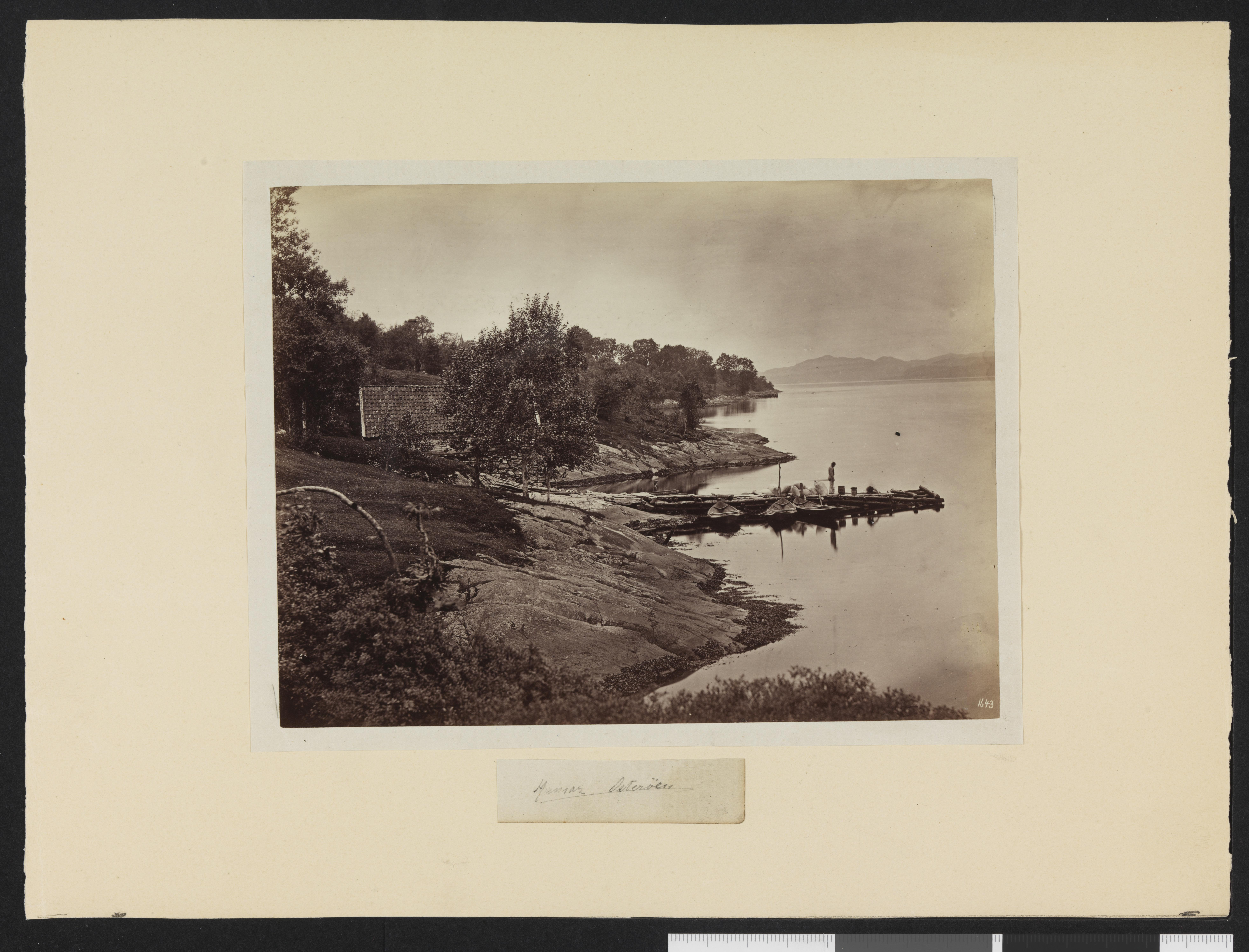 Bildet er hentet fra Nasjonalbibliotekets bildesamling Hamre, Osterøy, Hordaland